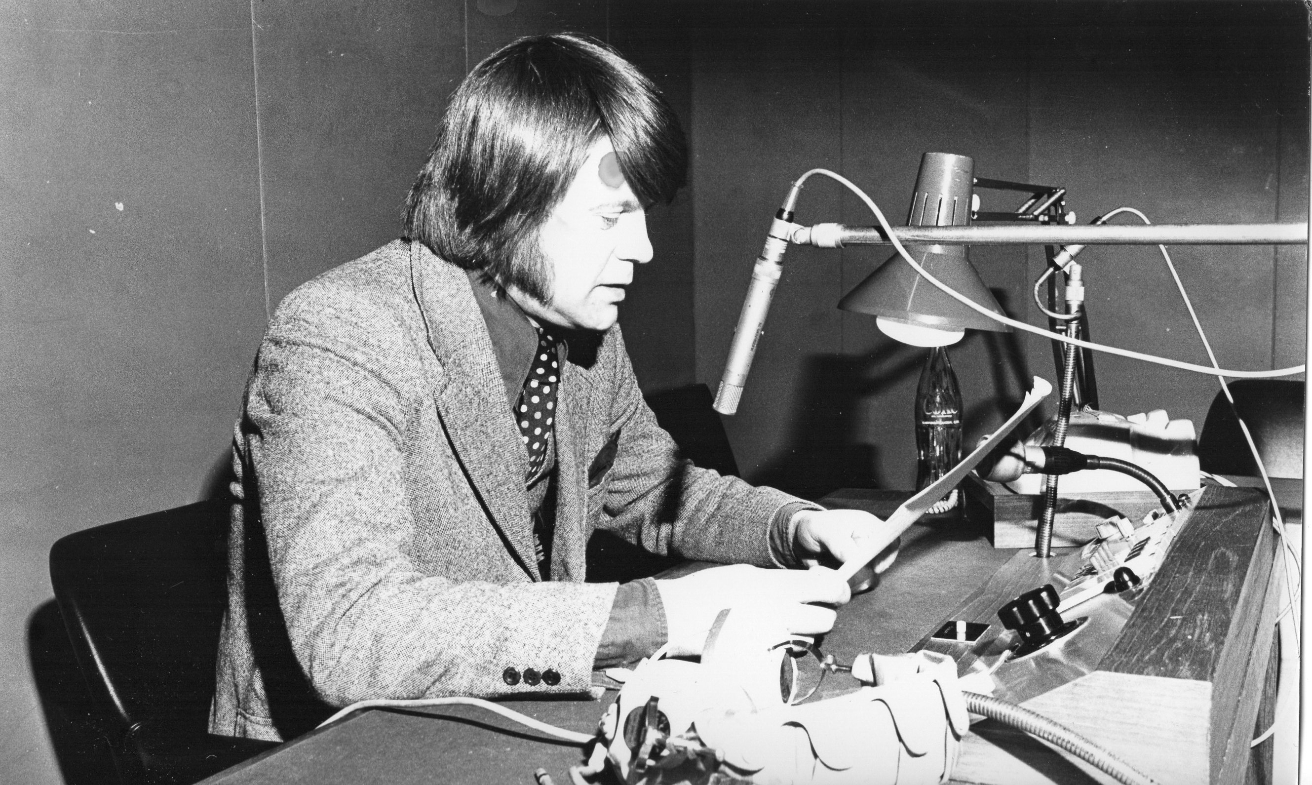 Heikki-Tapio Nieminen Yleisradion radiostudiossa 1970-luvulla